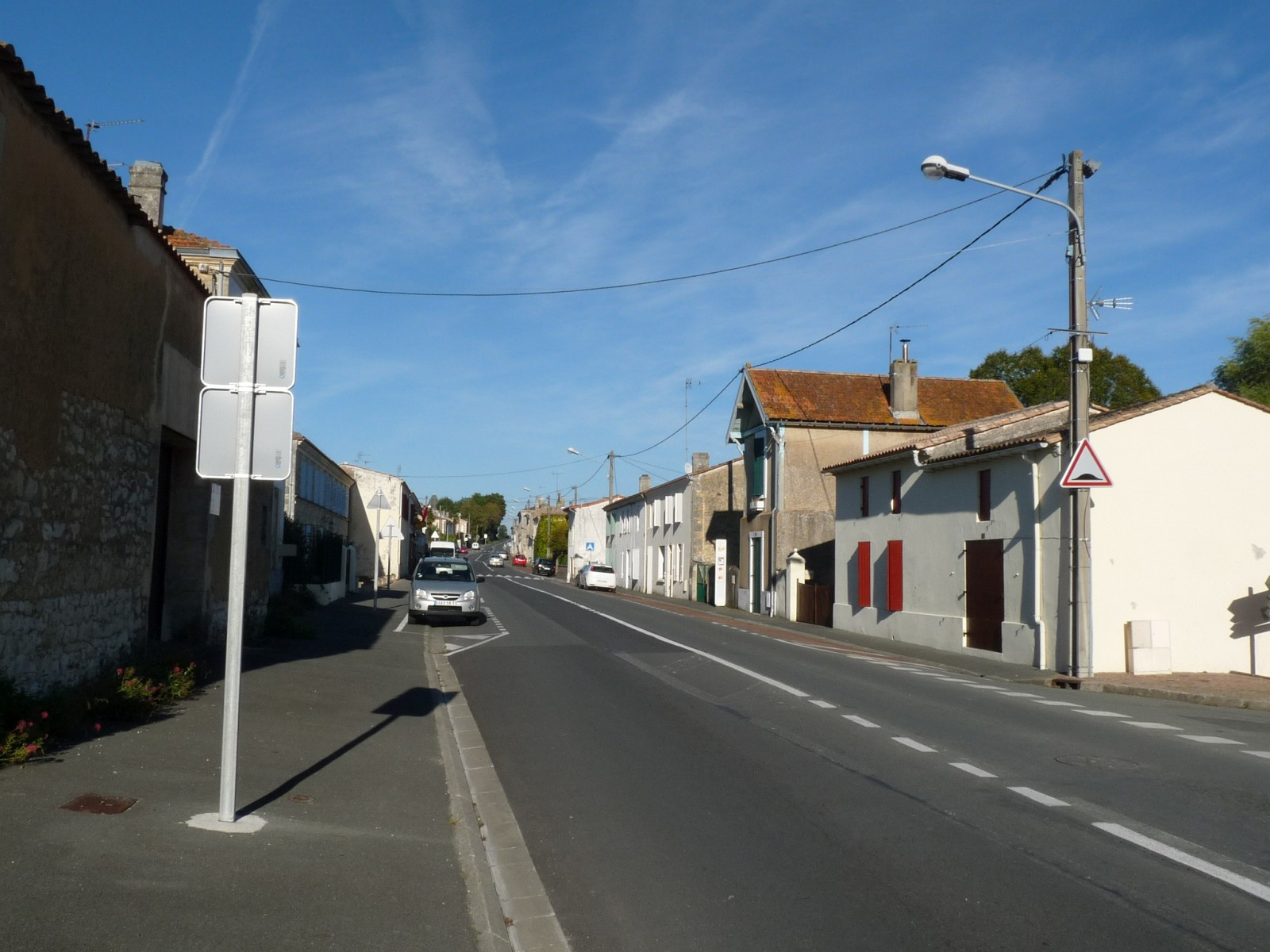 Rue principale (D.937 ex N.137, ancienne voie romaine), Saint-Martin-Lacaussade, Gironde, France